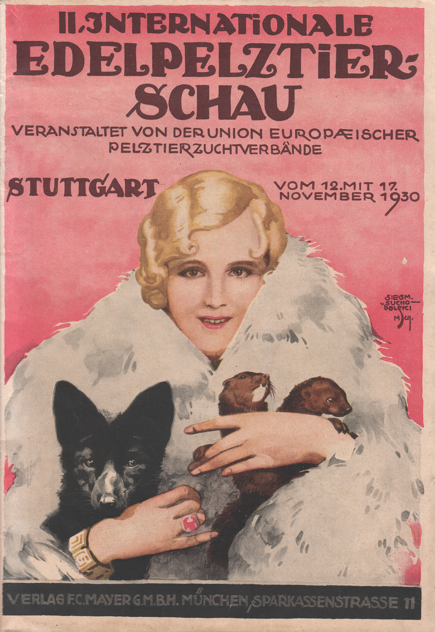 Buchdeckel einer Publikation zur II. Internationale Edelpelztierausstellung veranstaltet im Auftrage der Union Europäischer Pelztierzuchtverbände in der Zeit vom 12. mit 17. November 1930 in der Gewerbehalle Stuttgart. Grafik: Siegmund von Suchodolski (* 8. Juli 1875 in Weimar; † 28. Juli 1935 in München) Verlag F. C. Mayer G.M.B.H., München, Sparkassenstraße 11 80 Seiten, 18 x 26 cm